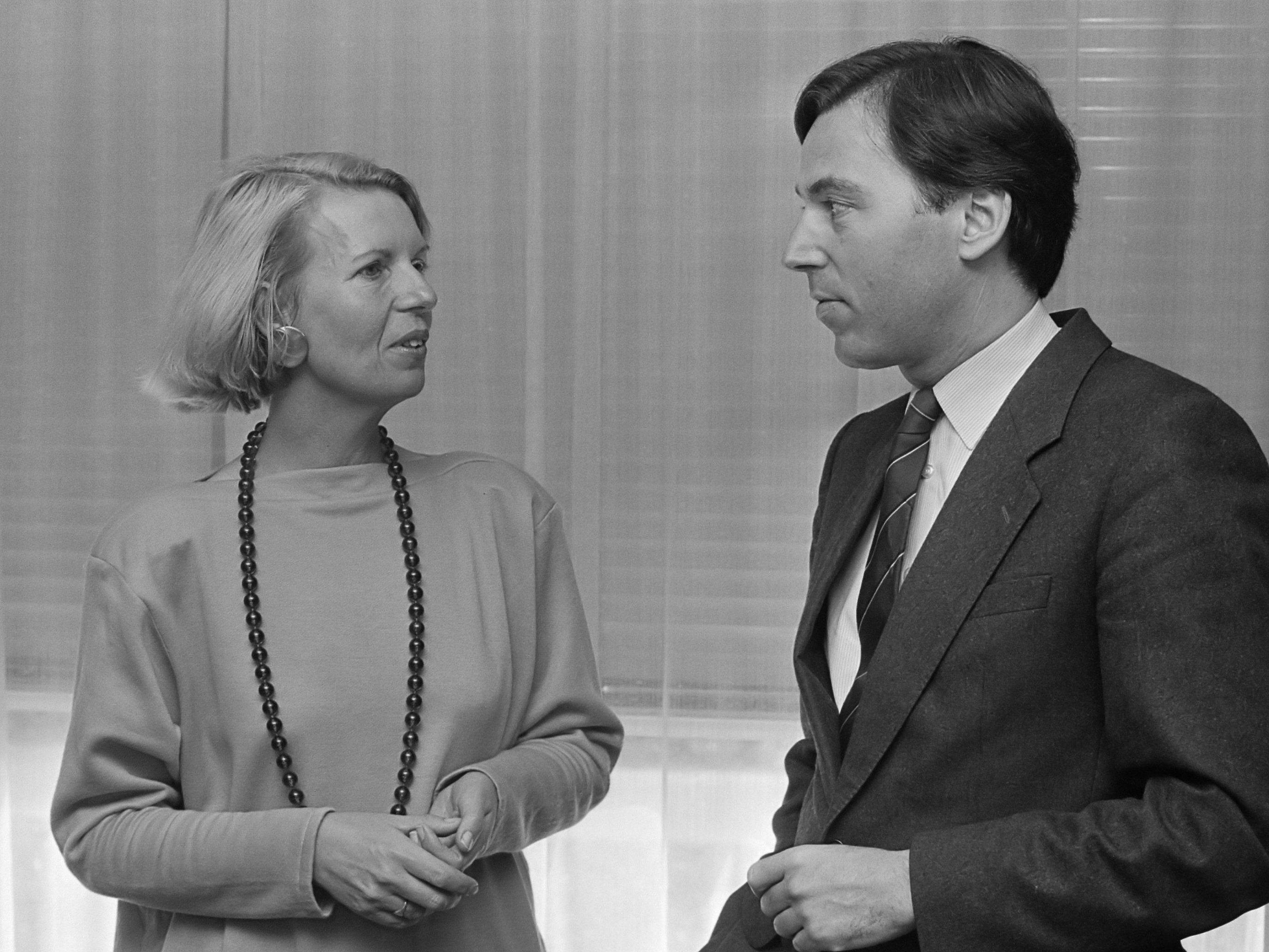 Minister Brinkman installeert mevr. M. M. van der Brink tot voorzitter Raad voor Jeugdbeleid in Den Haag (tevens opdracht); mevr. van der Brin en minister 6 oktober 1986